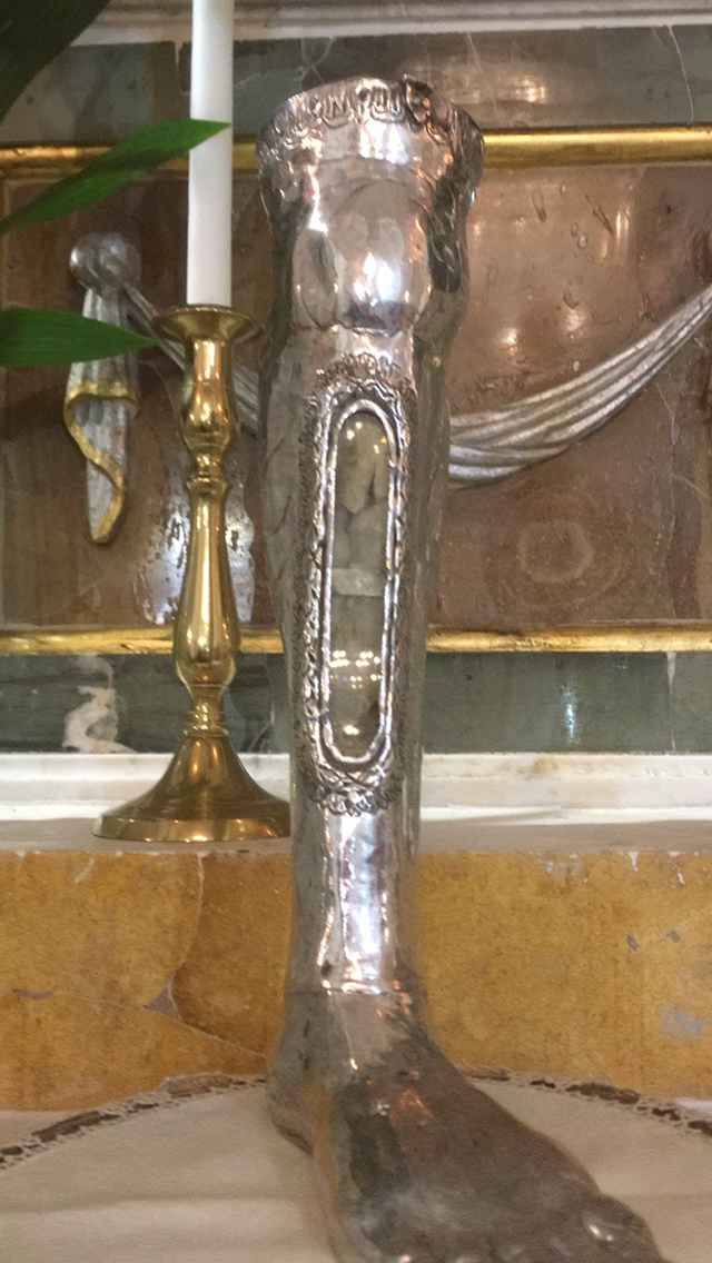 Reliquiario